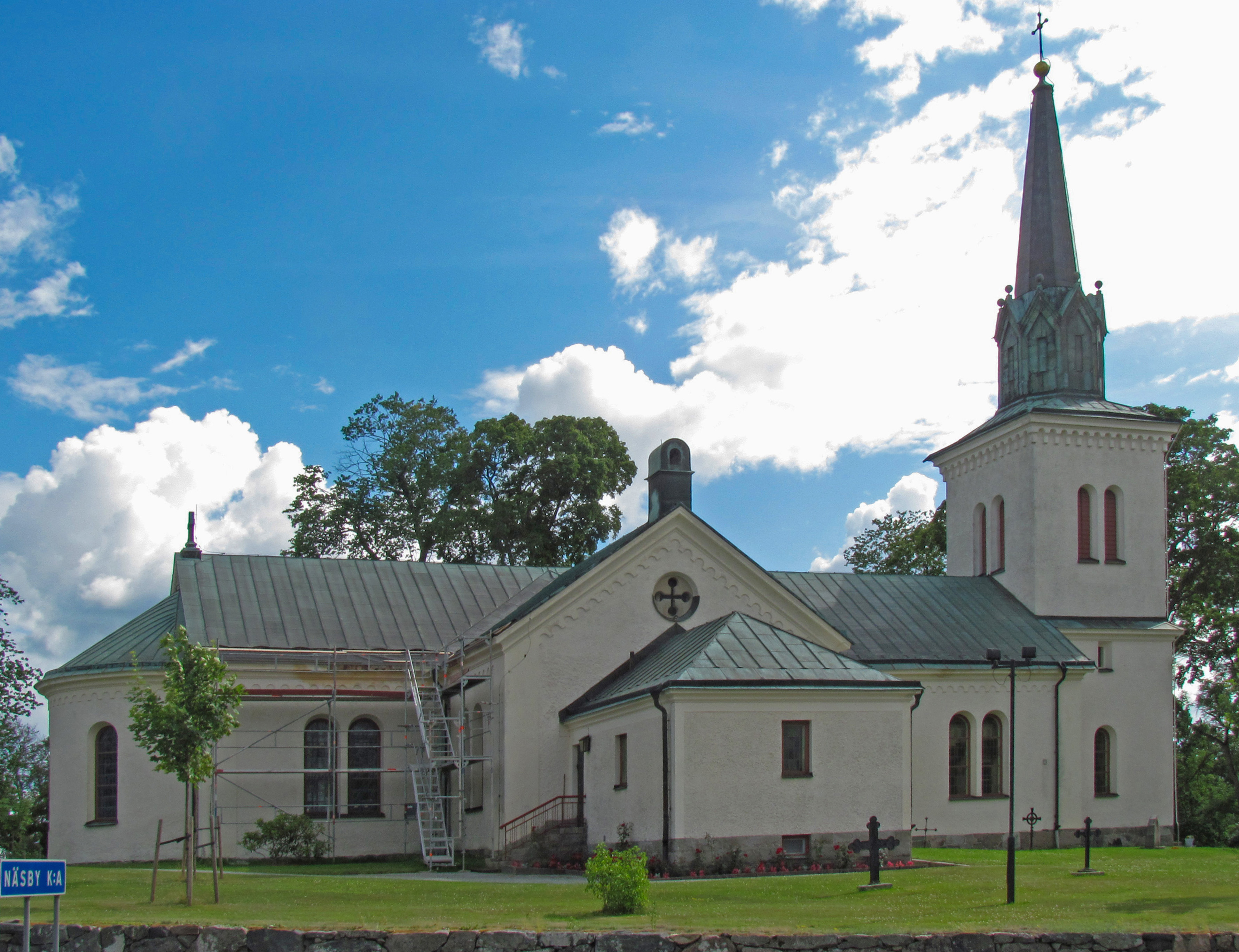 Näsby kyrka, Västmanland